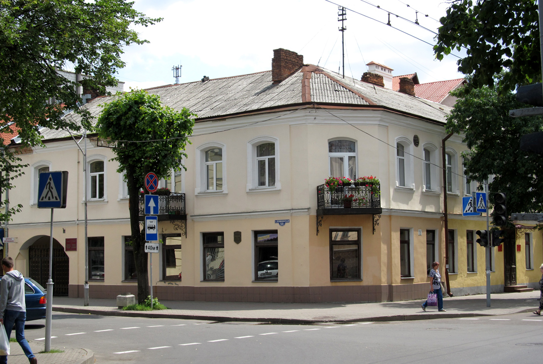 Брэст. Вуліца Пушкінская, 11 / Вуліца Камсамольская, 38